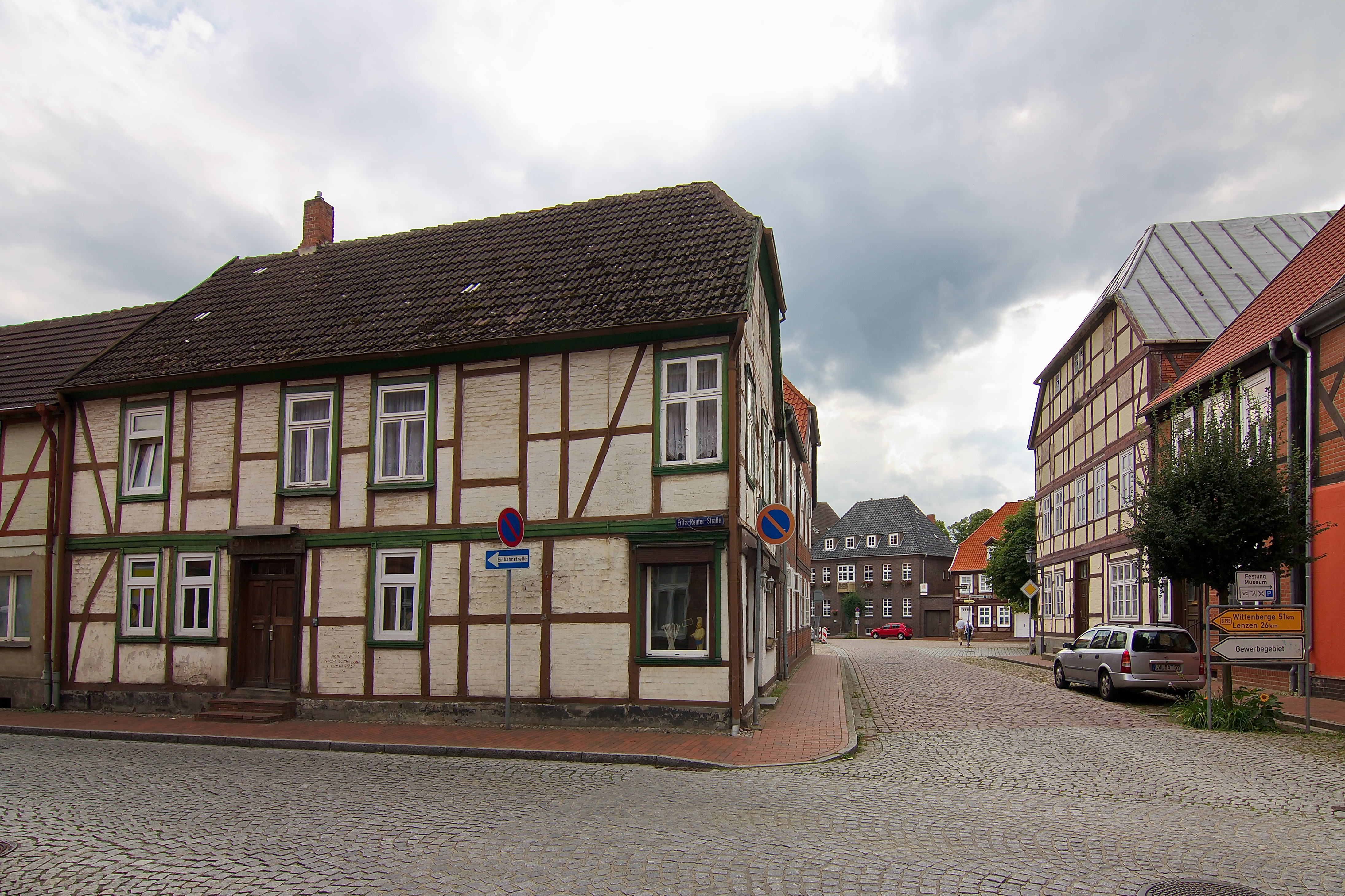 Baudenkmal in Dömitz (Mecklenburg-Vorpommern), Deutschland